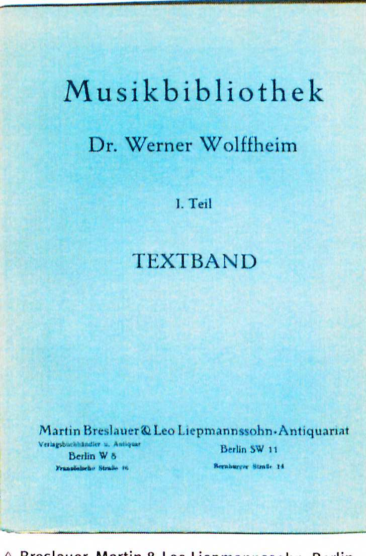 Martin Breslauer, Leo Liepmannssohn Versteigerung der Musikbibliothek Werner Wolffheim 1928-1929